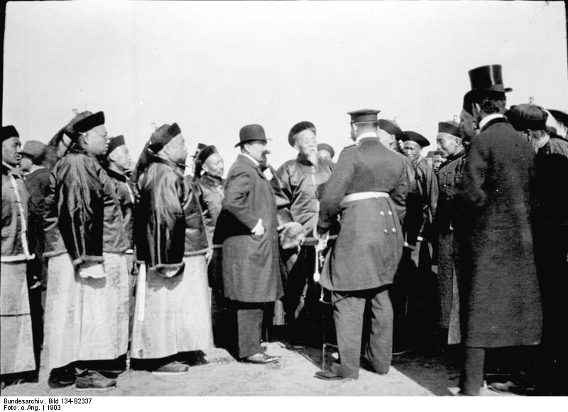 Schutzgebiet Kiautschou 1903: Besuch Gouverneur Chou Fu in Tsingtau